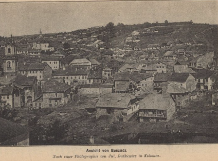 центр Бучача часів Австро-Угорщини